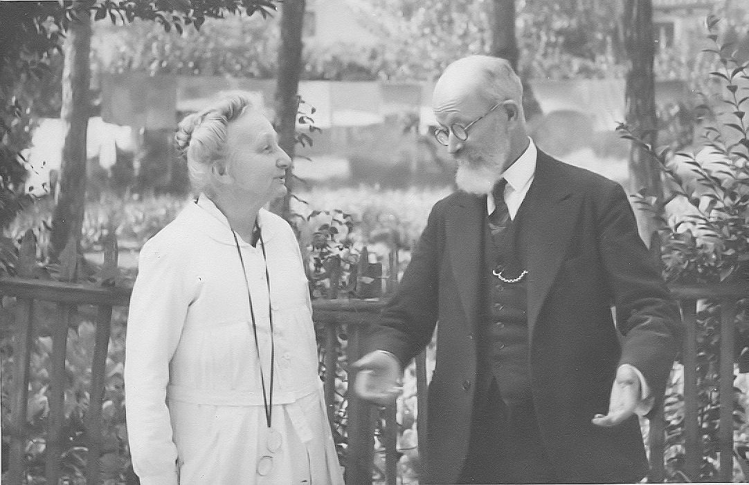 Marie-Louise Rochebillard à l'Hôpital "Le bon abri" à Lyon.